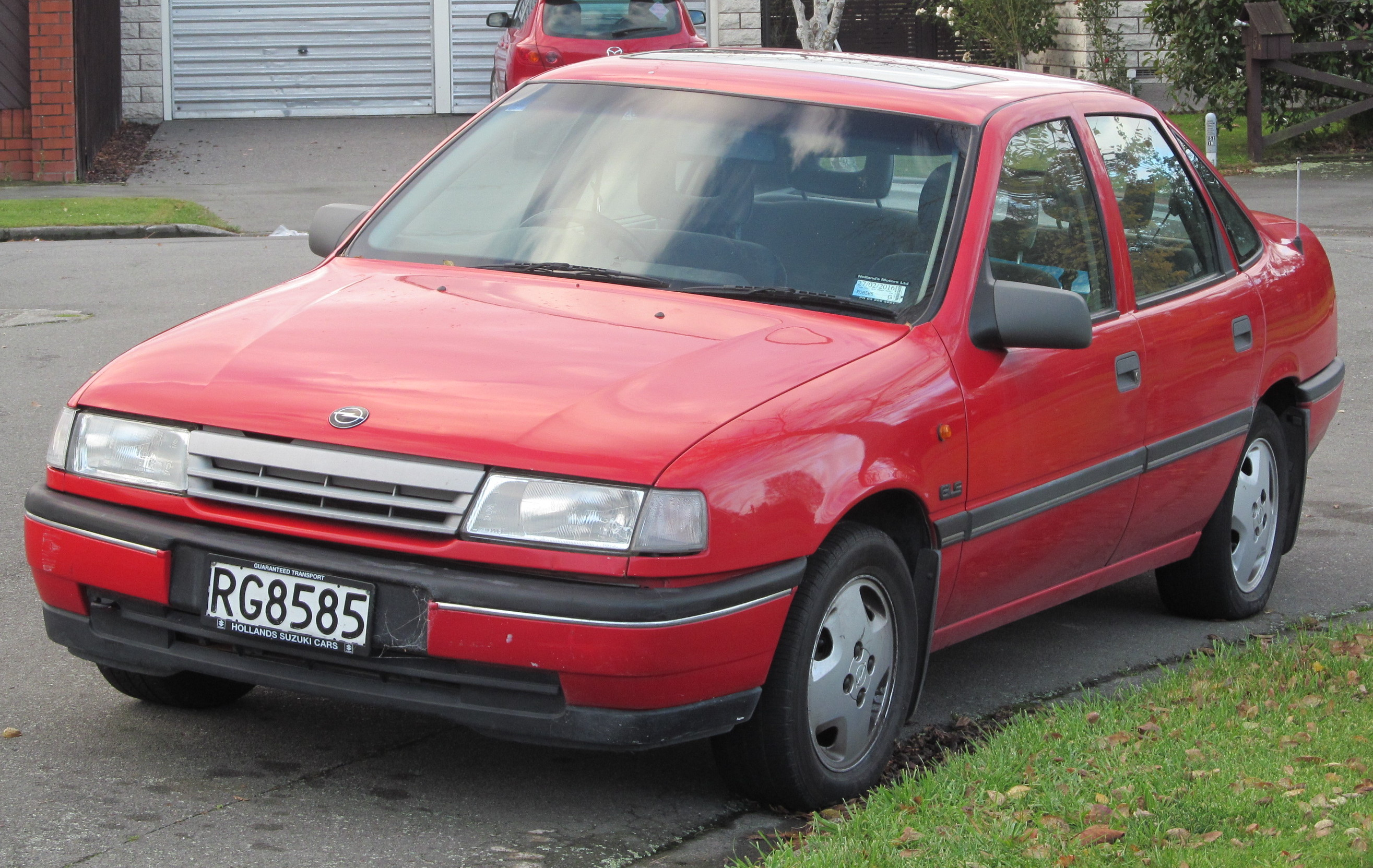 1990 Opel Vectra GLS